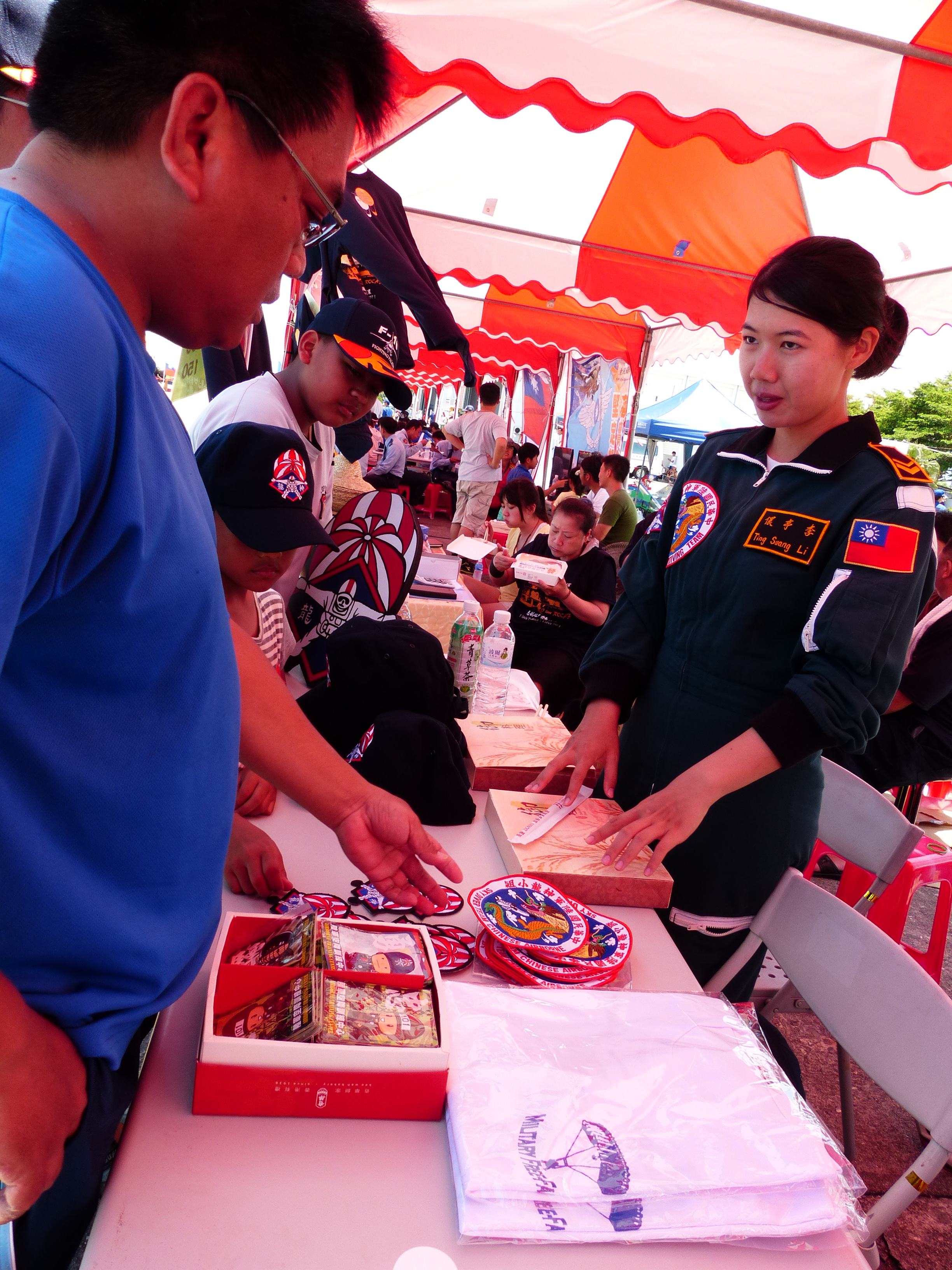 2013年志航基地營區開放活動中午，攤位前購買陸軍神龍小組紀念品的遊客。